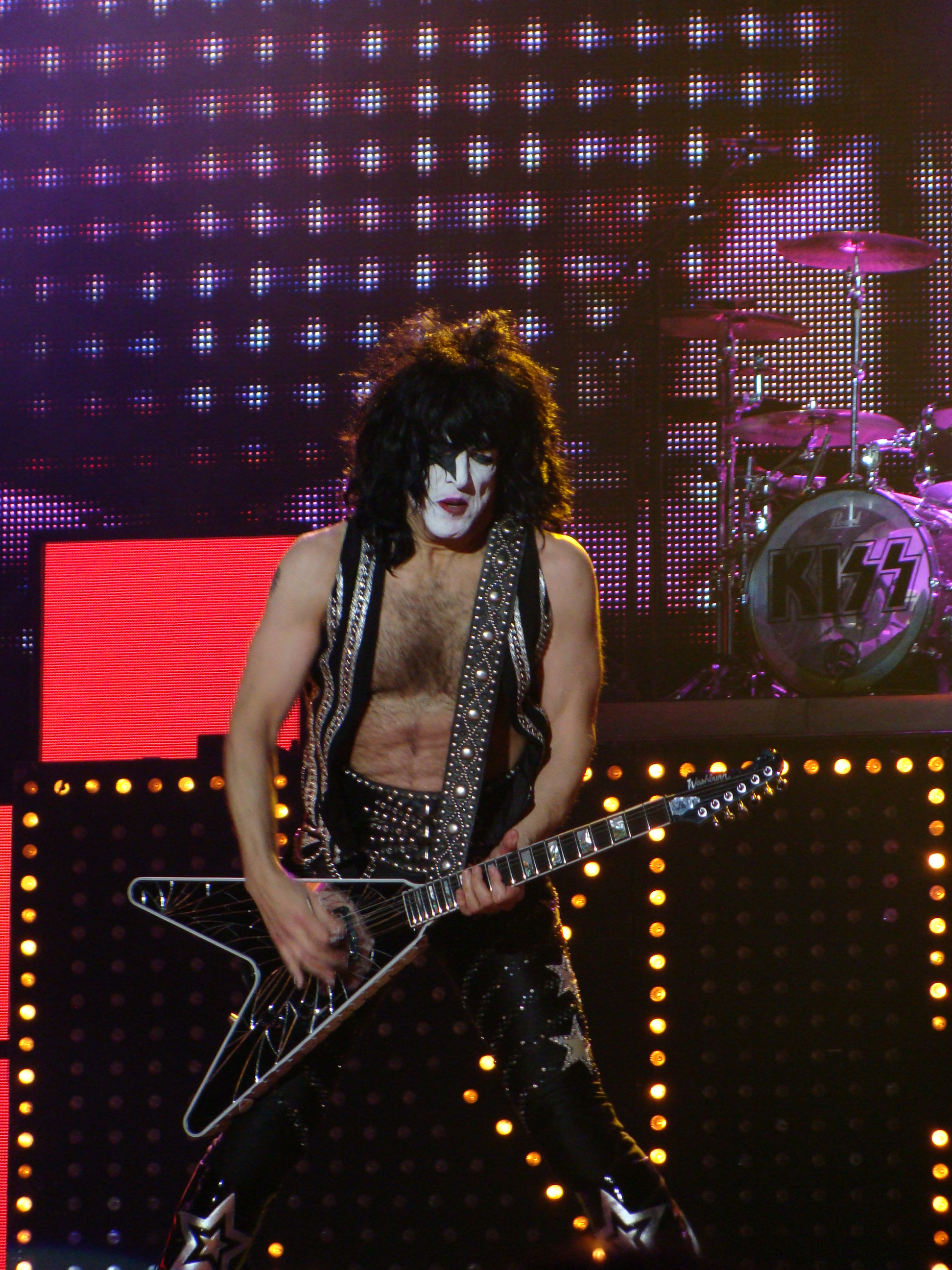 Paul Stanley, en una actuación del grupo KISS en Vitoria-Gasteiz, en el Azkena Rock Festival.